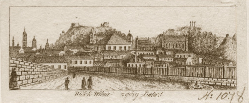 Беларуская (тарашкевіца): Вільня (Vilnia) з гары Бакшты (Bakšta)